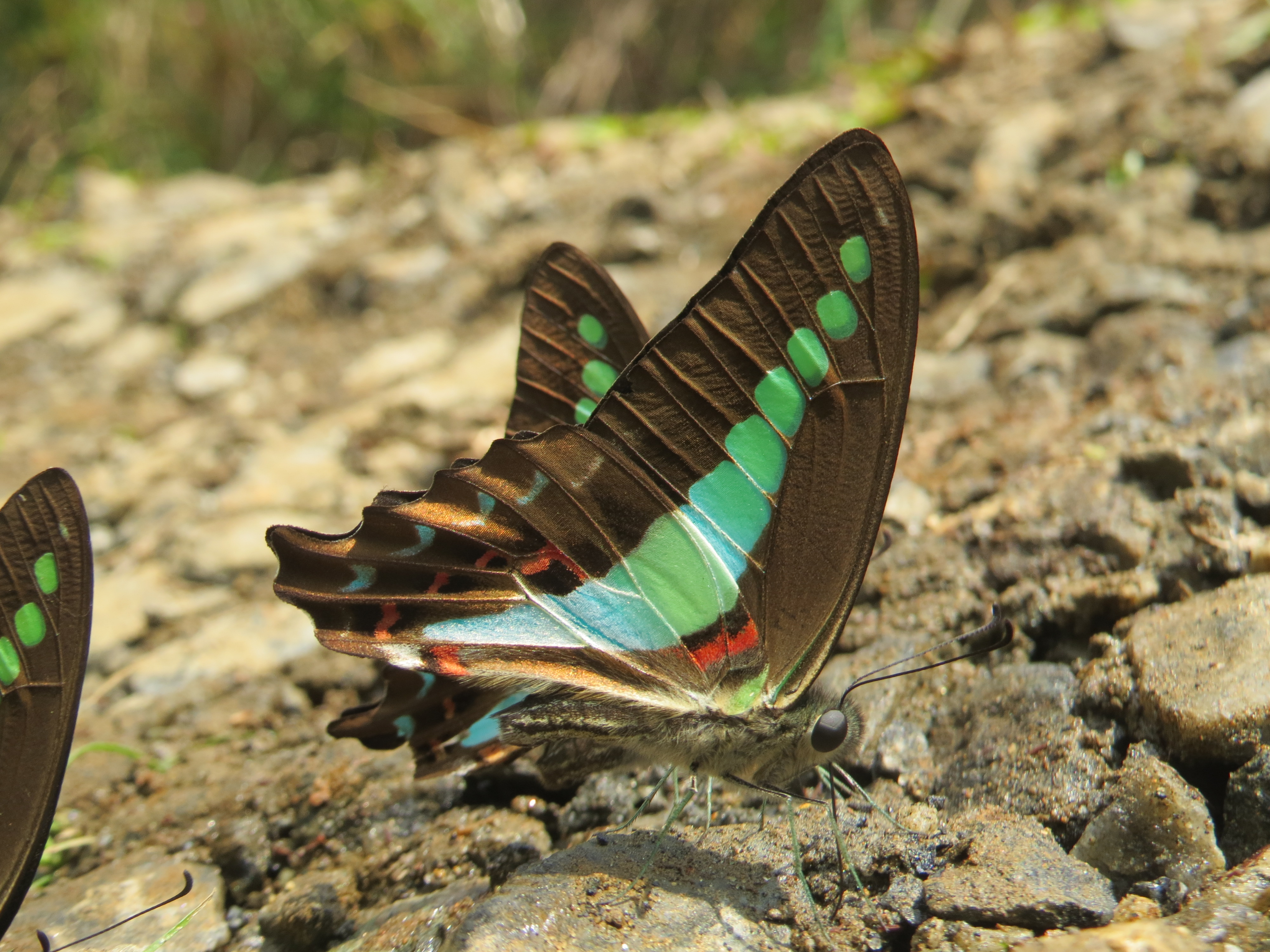 Photos from Periya, Wayanad, Kerala, India.